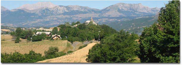 Vue du village de Montgardin.